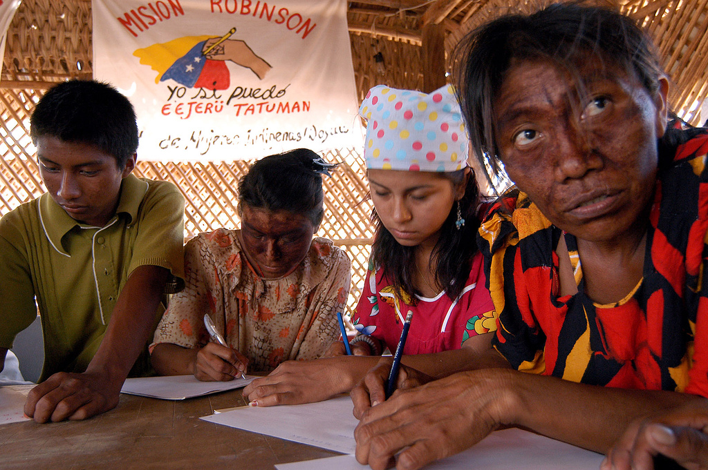 Indígenas de la etnia Wayuu aprenden a leer y escribir con la misión Robinson. Lugar: Casusai, Parroquia Alta Guajira, Municipio Paez, Estado Zulia. Foto: Franklin Reyes/J.Rebelde